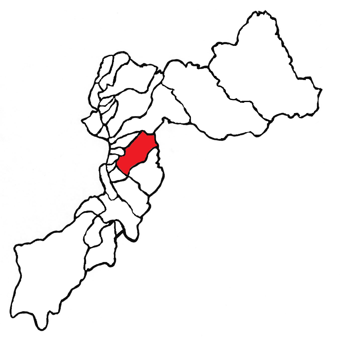 Ubicación del distrito en la provincia de Huancayo, departamento de Junín, Perú